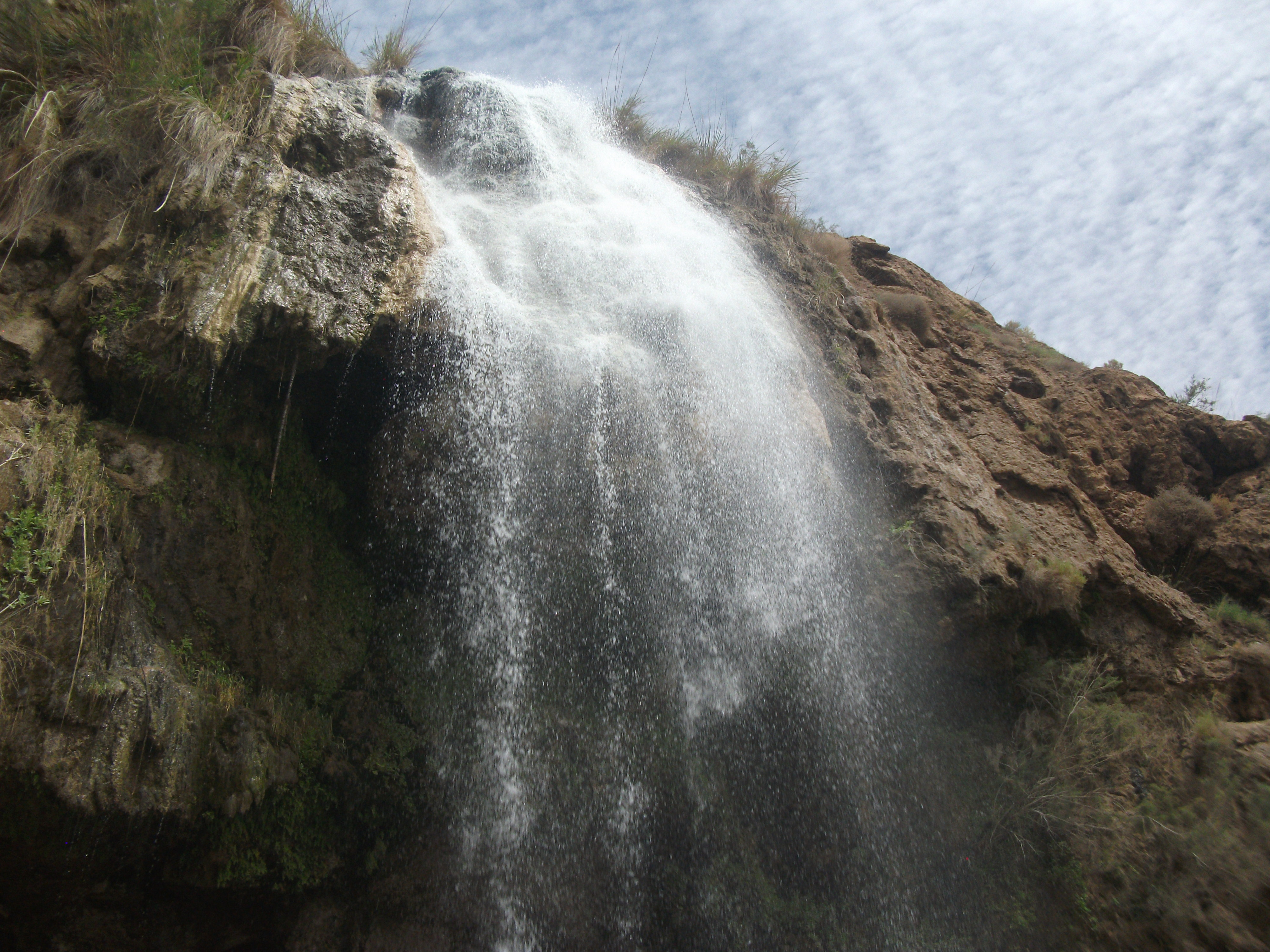 شلالال حمامات ماعين